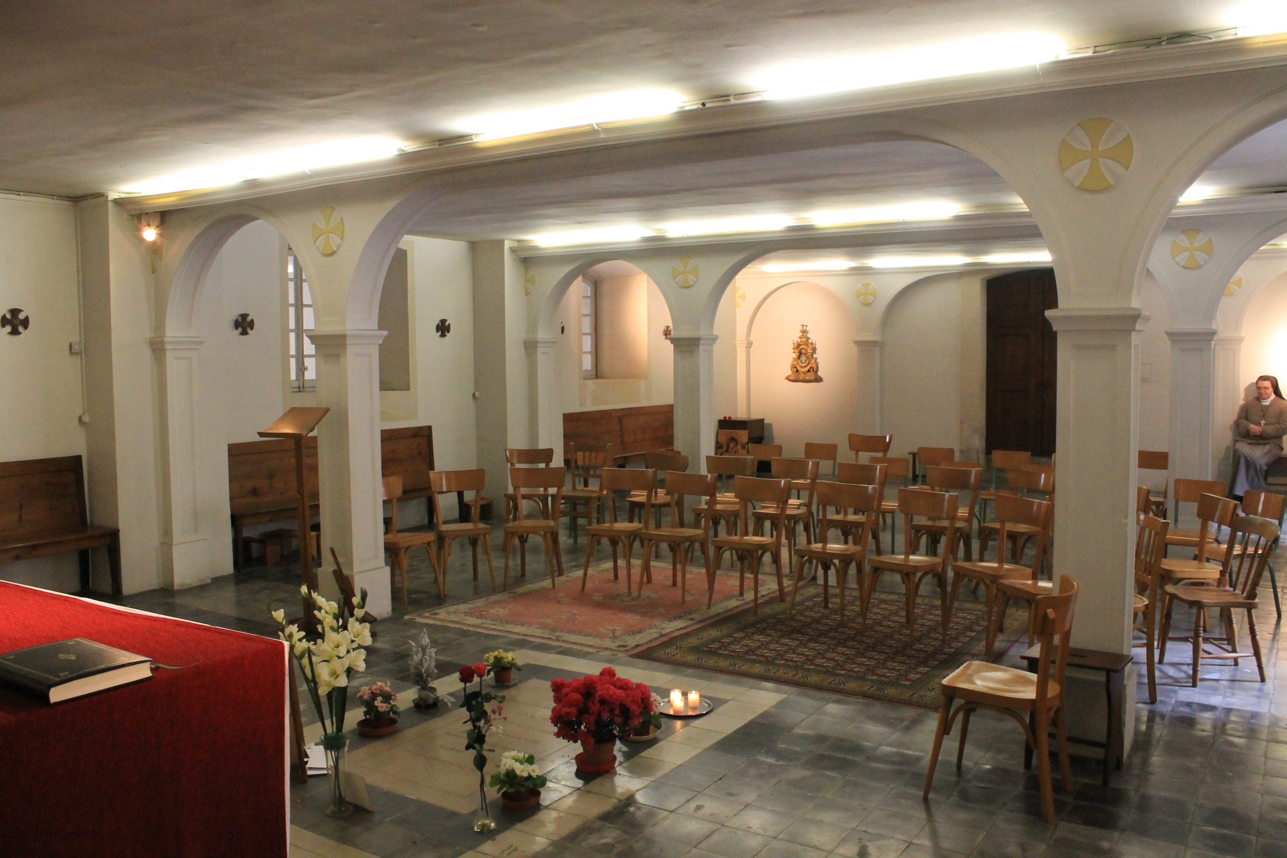 Crypte de la chapelle du Monastère des Visitandines où est inhumée Léonie Martin, la sœur de Thérèse de Lisieux